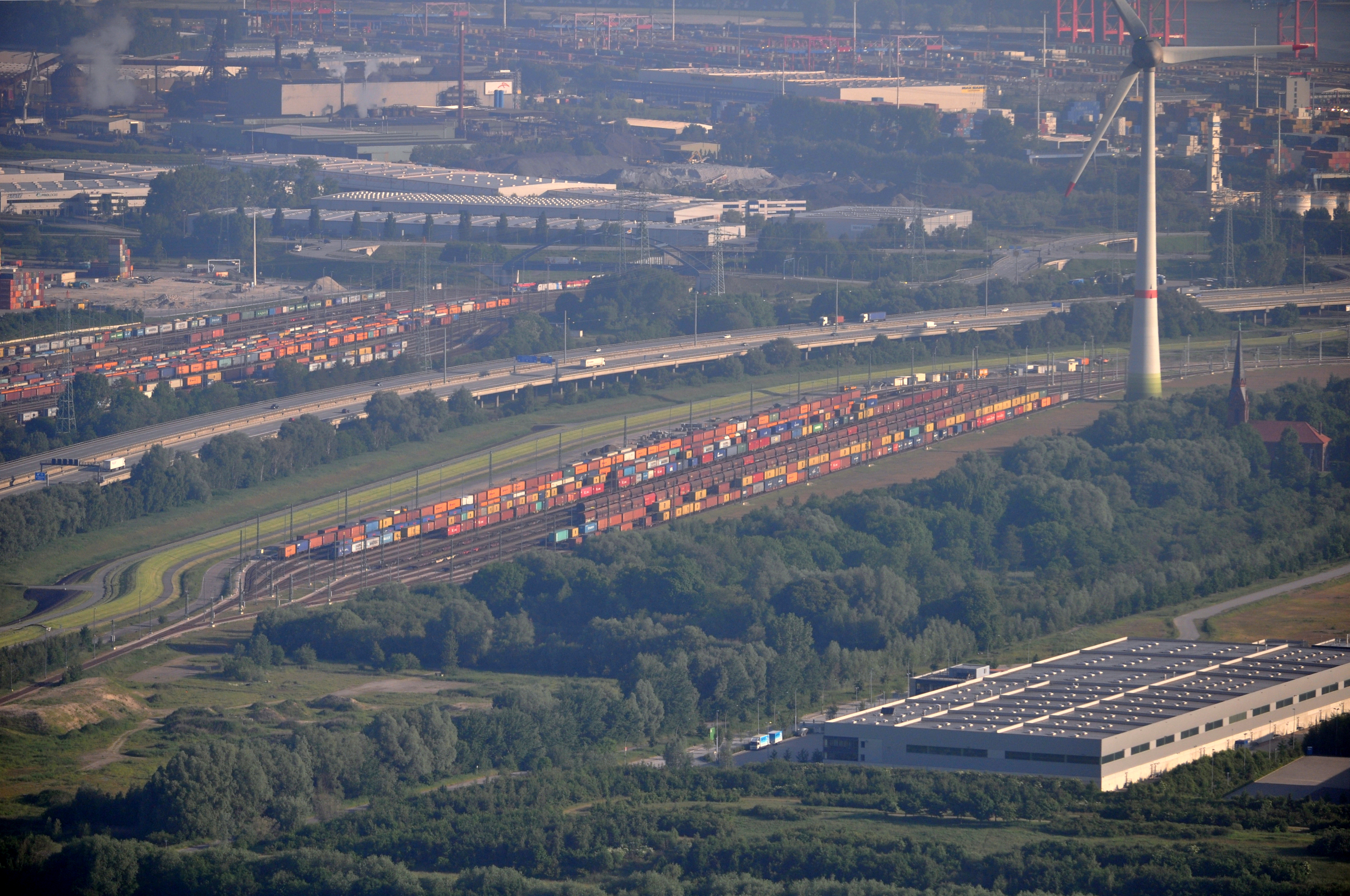 Bundesautobahn 7 auf der Hochstraße Elbmarsch in Hamburg-Altenwerder, im Vordergrund zum Containerterminal Altenwerder gehörende Rangiergleise der Hamburger Hafenbahn.